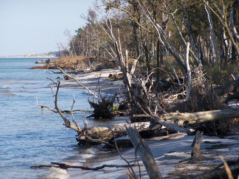 Nationalpark Vorpommersche Boddenlandschaft, Außenküste